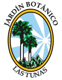 Logotipo del JBLT